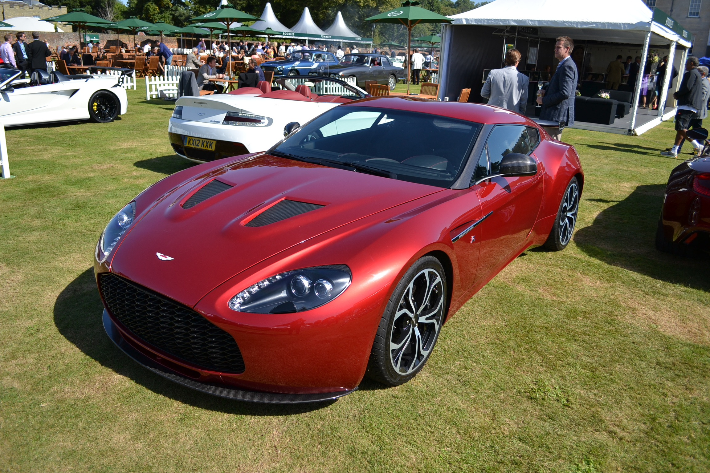 Salon Privé London 2012